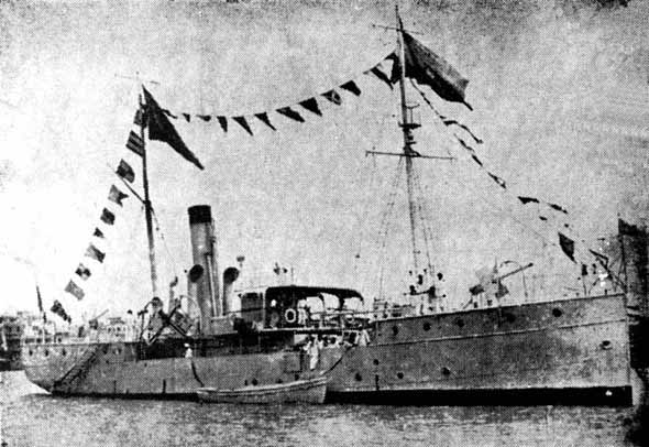 Cañonero de bandera Ecuatoriana